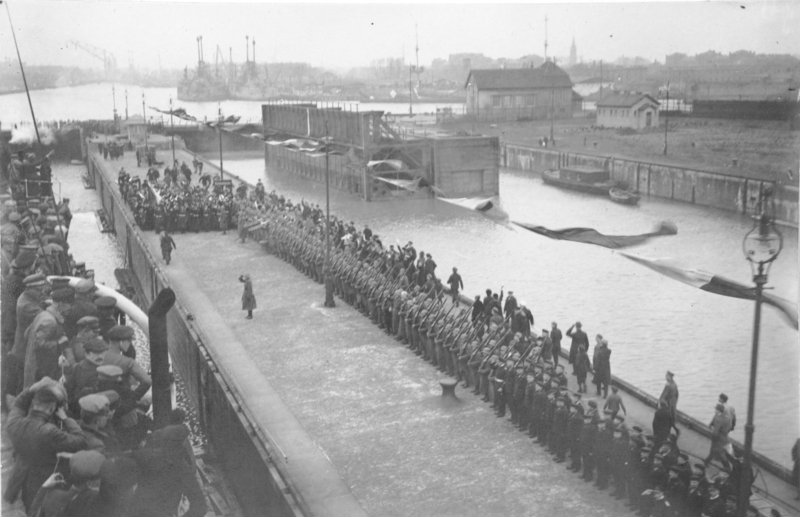 [Fotoalbum: Bilder aus China, von Ob.Matr.Artl. Quinten] China, Tsingtau um 1912